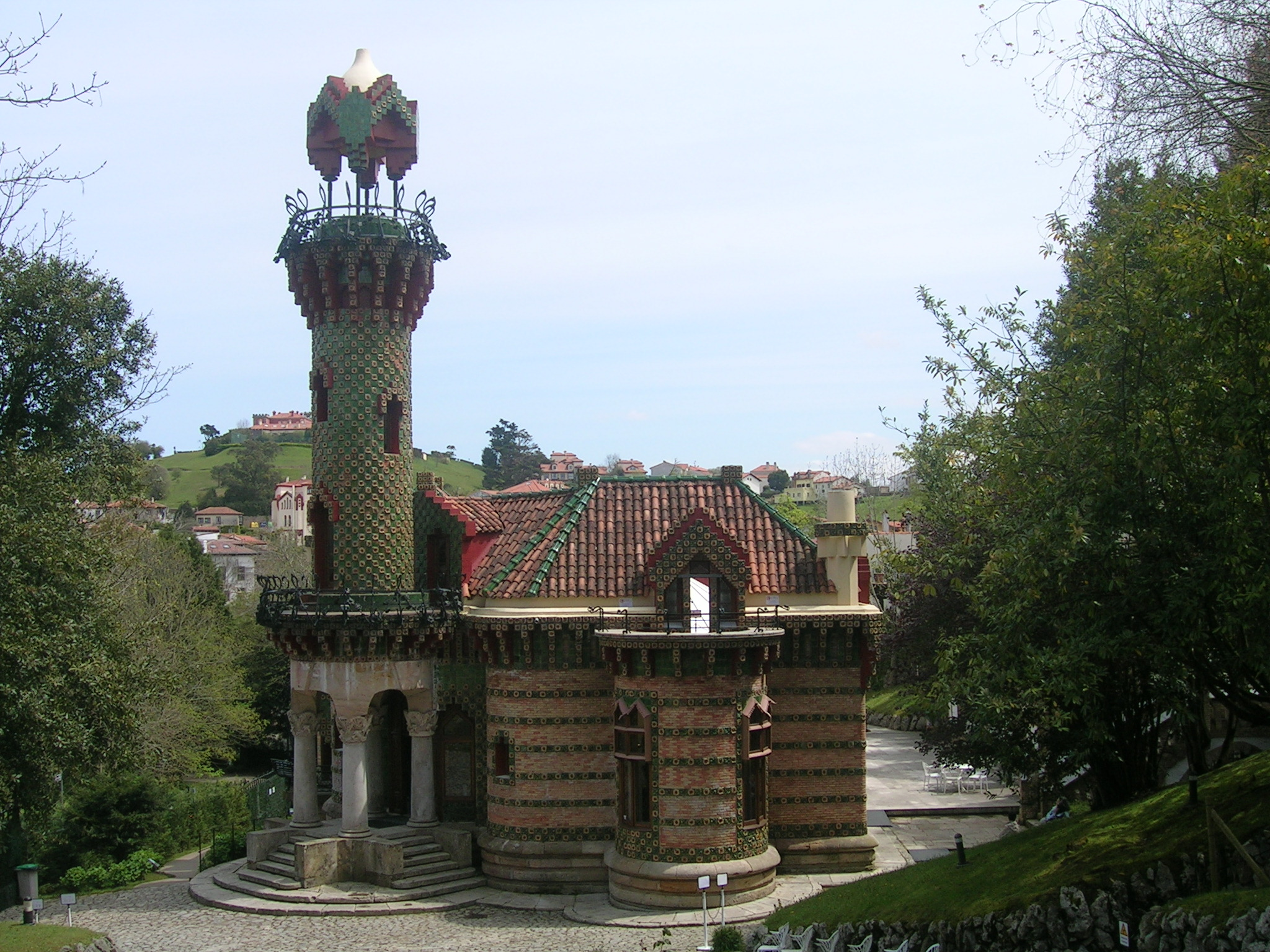 Llamado El Capricho de Gaudí. Declarado bien de interés cultural en 1969